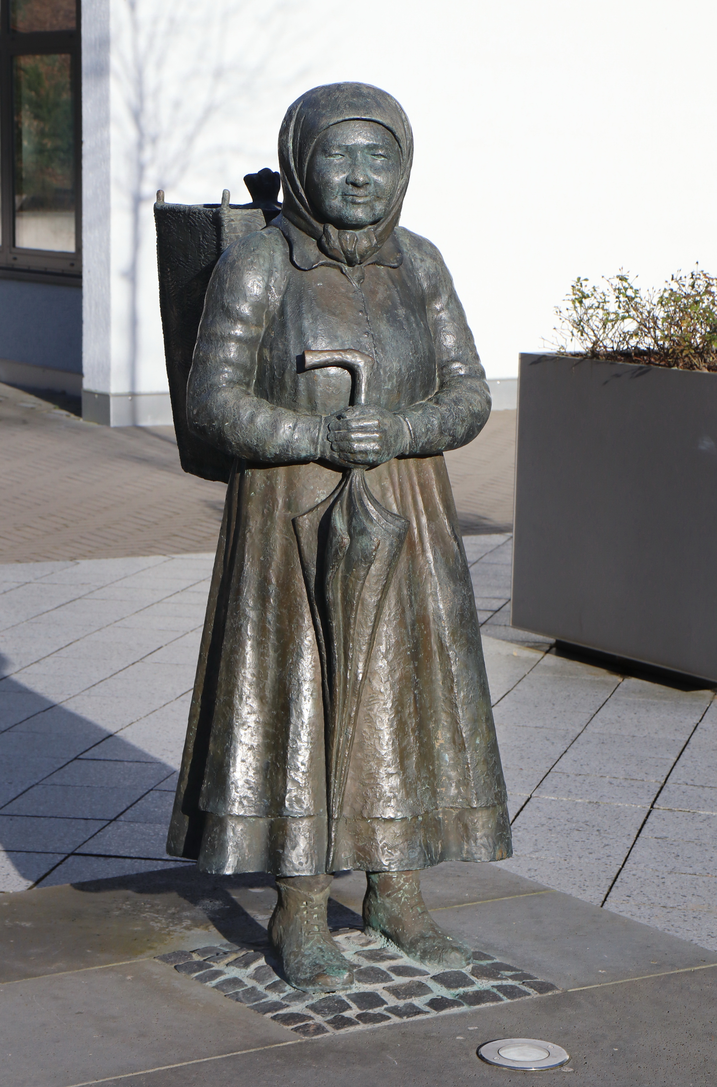 Bronzefigur "Kiepenlisettken" des Bildhauers Waldemar Wien auf dem Rathausplatz in Schalksmühle.